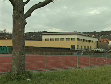 Mørkvedlia Idrettspark i Bodø